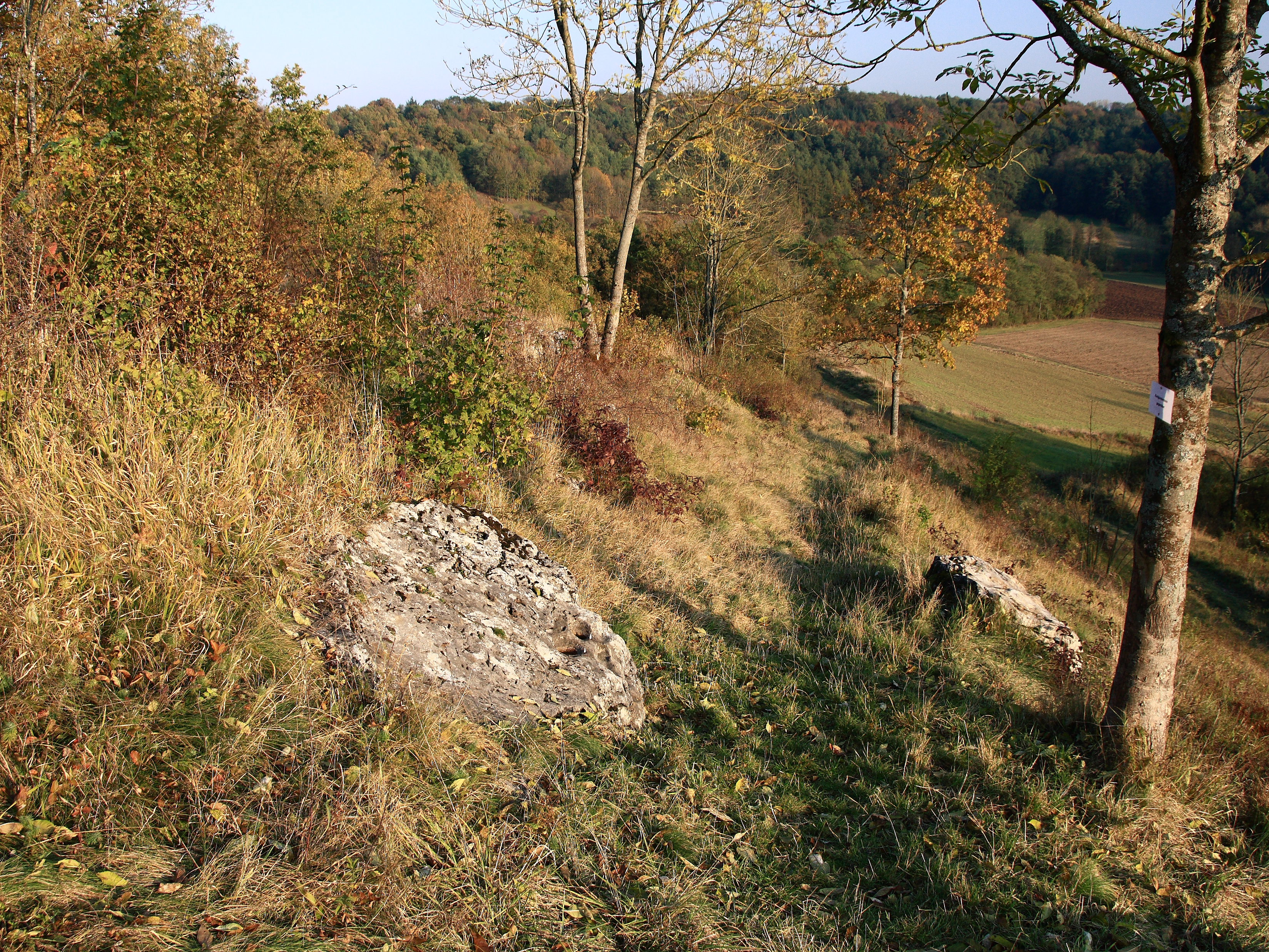 Der Kunigundenstein in der Nähe der Kunigundenkapelle im Auber Ortsteil Burgerroth.